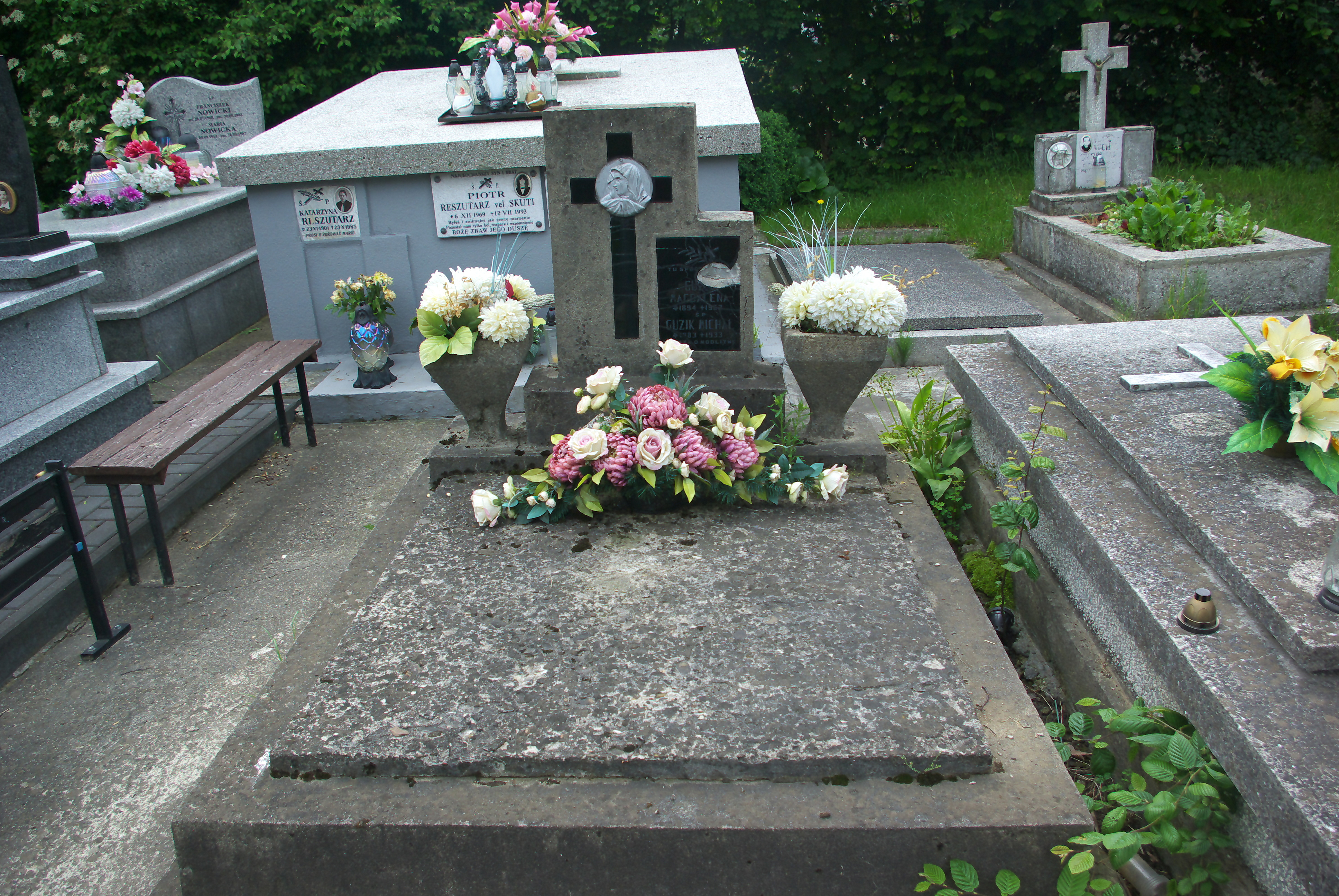 Grobowiec Michała i Magdaleny Guzików na Cmentarzu Centralnym w Sanoku (2020).